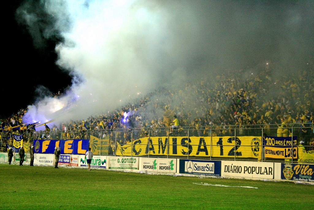 A torcida do Pelotas na decisão da Copa FGF 2008.